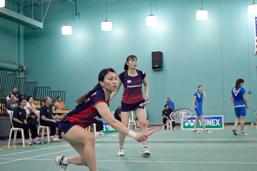 Shizuka Matsuo and Mami Naito